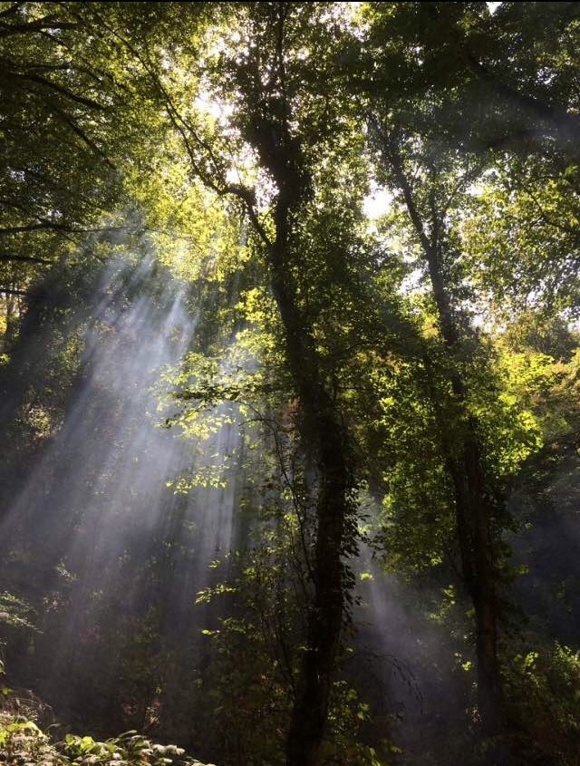 Qəbələ, Yeddi Gözəl Şəlaləsi Meşəsi